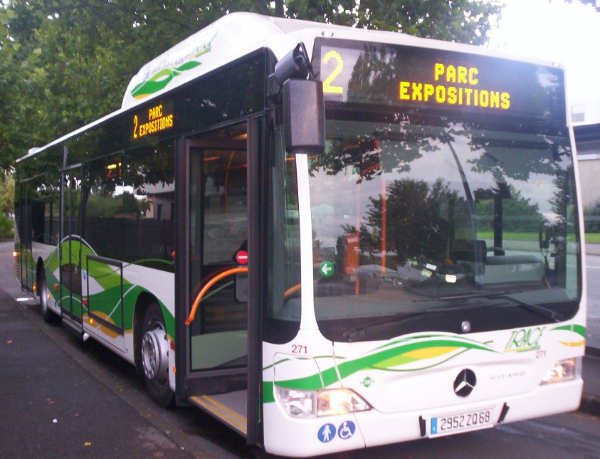 Autobus sur la ligne 2 fonctionnant au GNV.